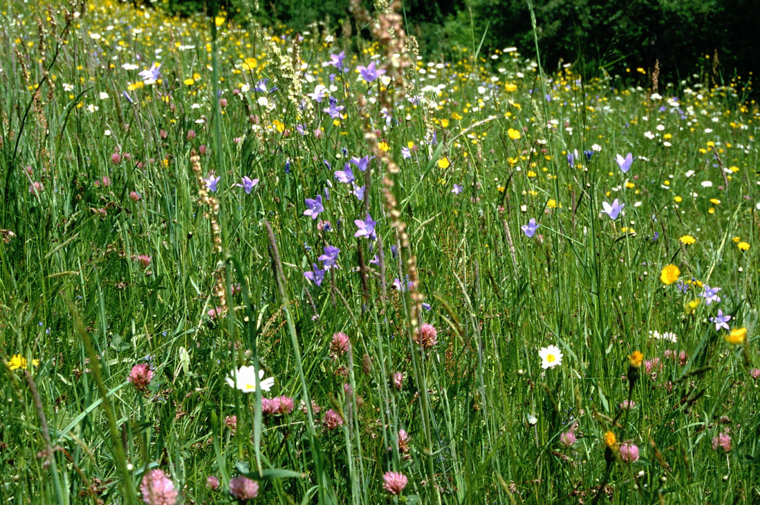 Frischwiese bunt (Extensiv-Grünland mit einer Ertragserwartung von 60 dt TM/ha bei zwei Nutzungen)